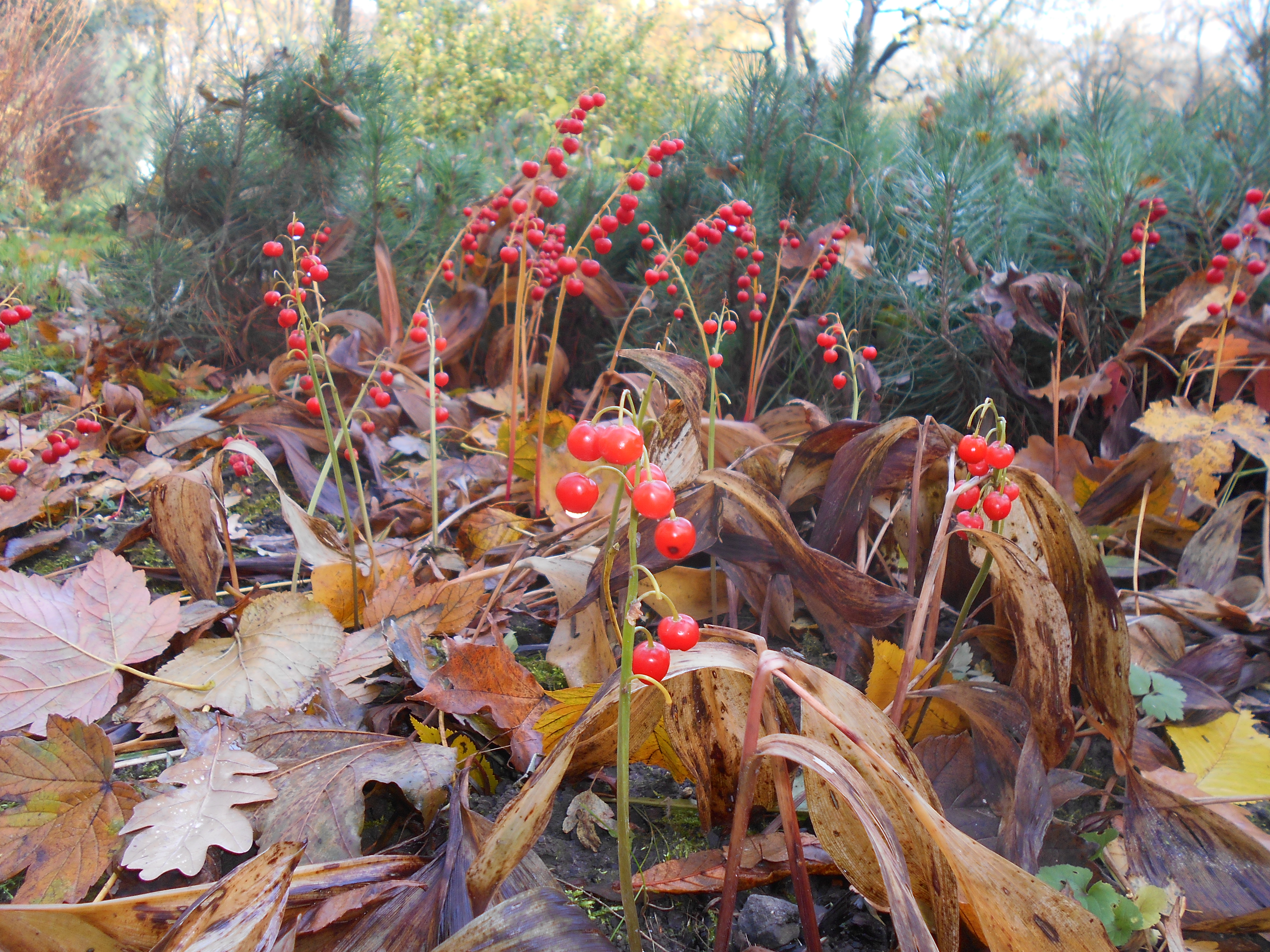 Konwalia majowa (Convallaria majalis), Ogród Saski w Lublinie.